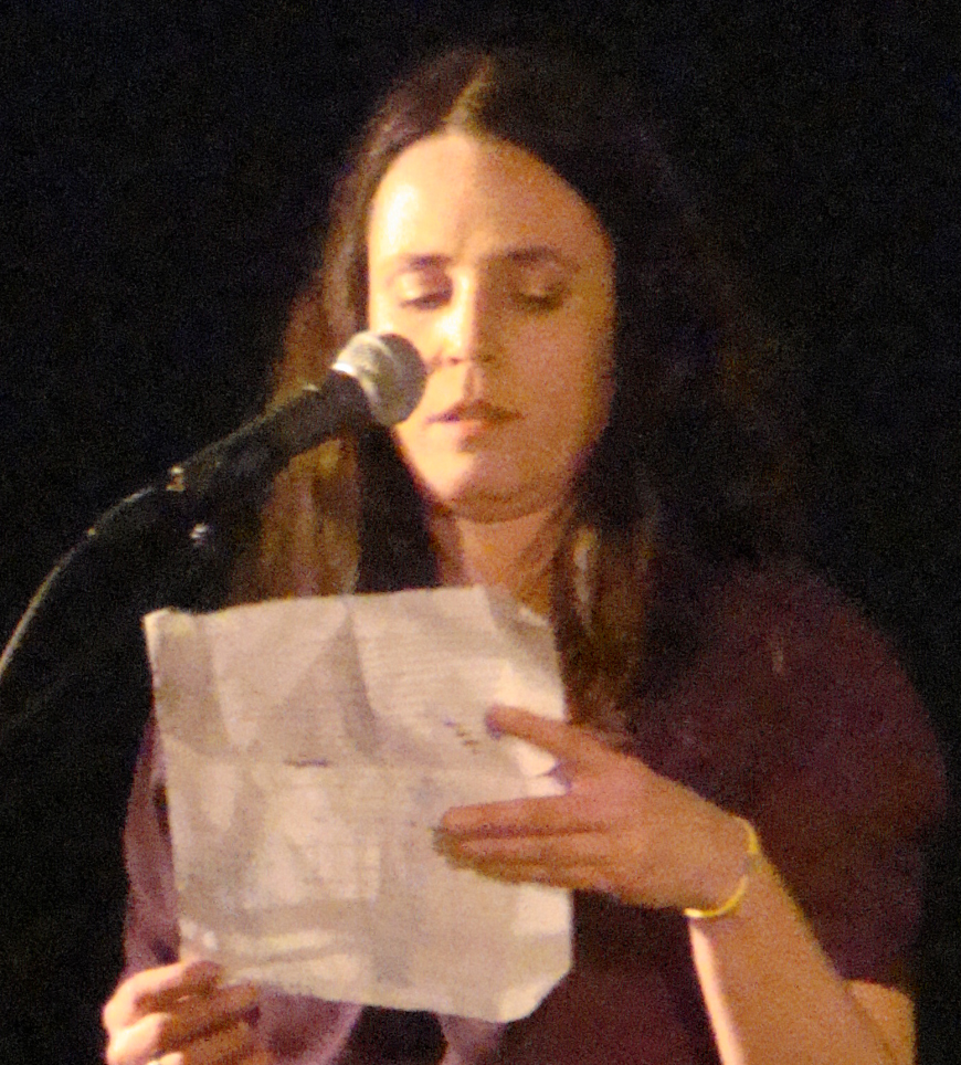 Forfatteren Mette Moestrup 2009